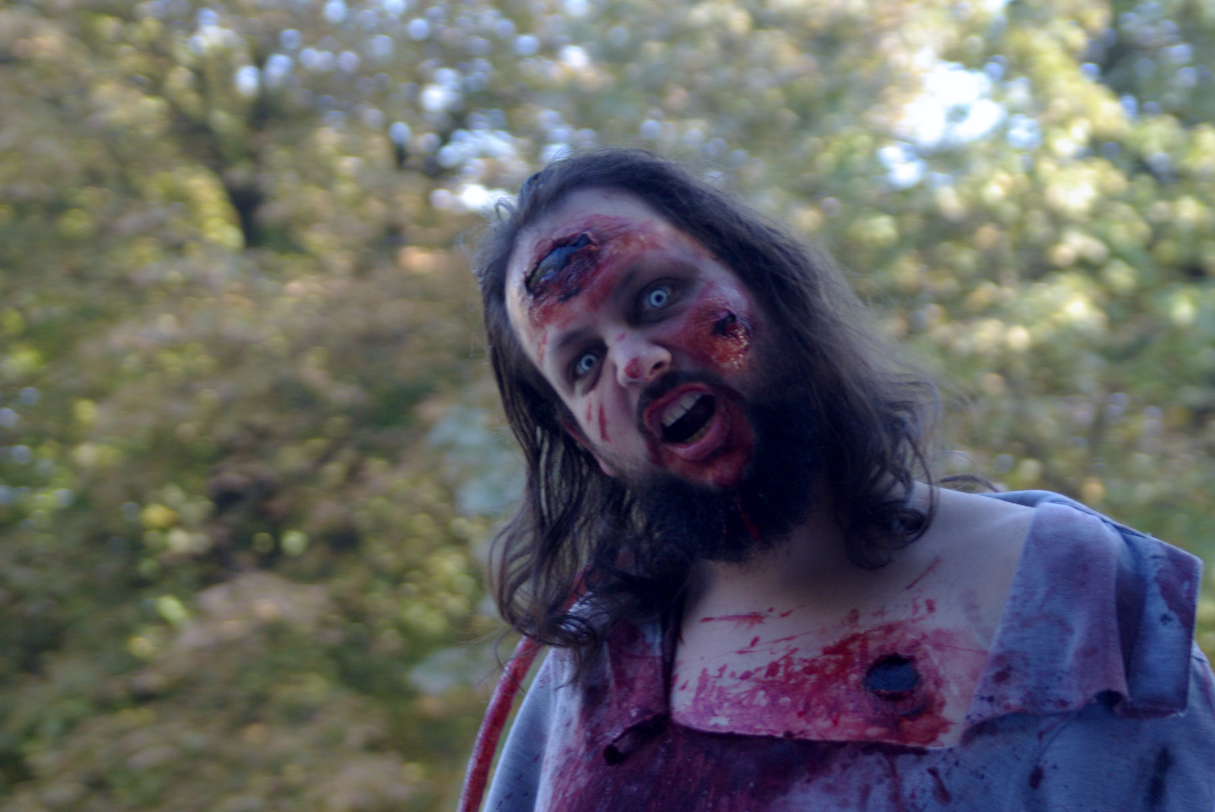 Zombies en la Plaza de los Vosgos, Les Marais, París